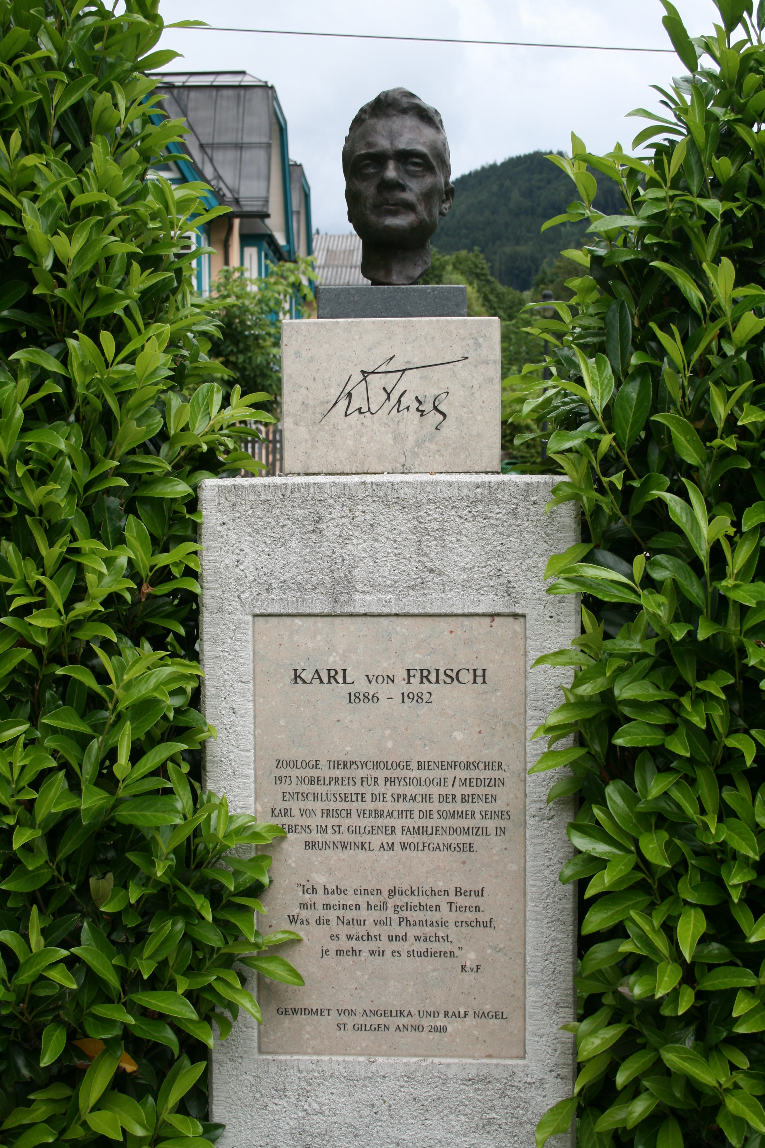 St. Gilgen, Karl von Frisch